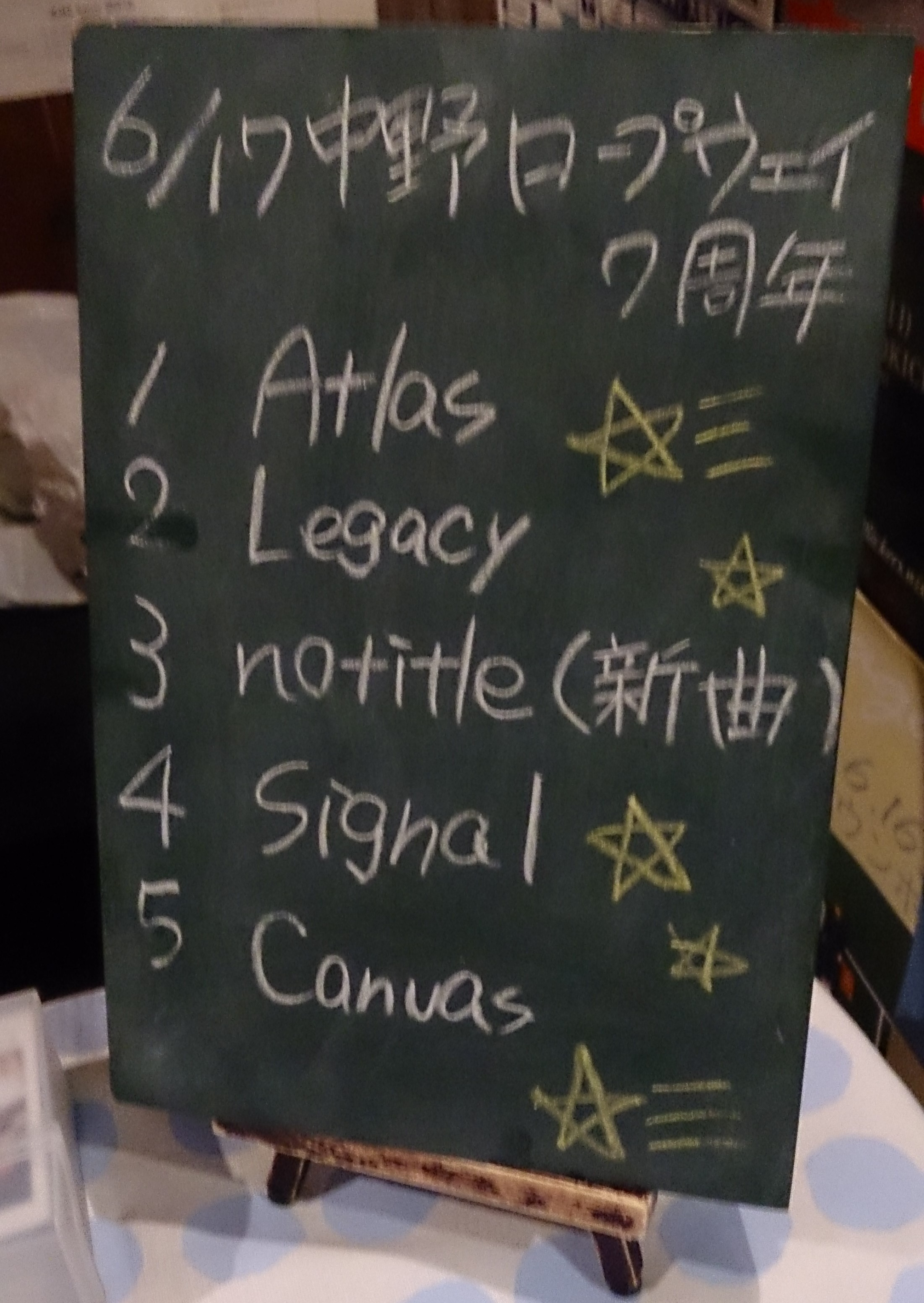 amiinAセトリボード(20160617(1))